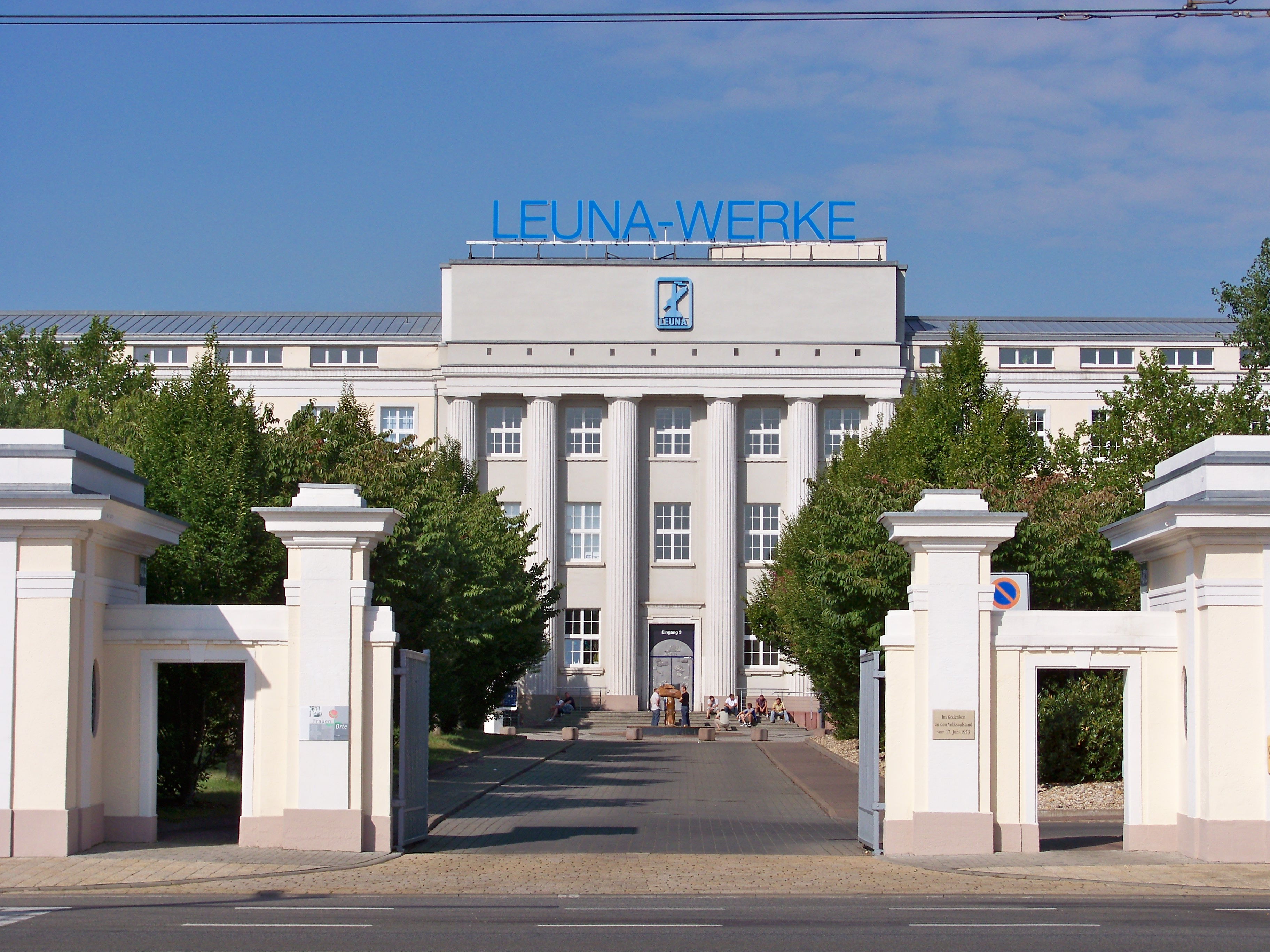 Verwaltung der Leuna Werke